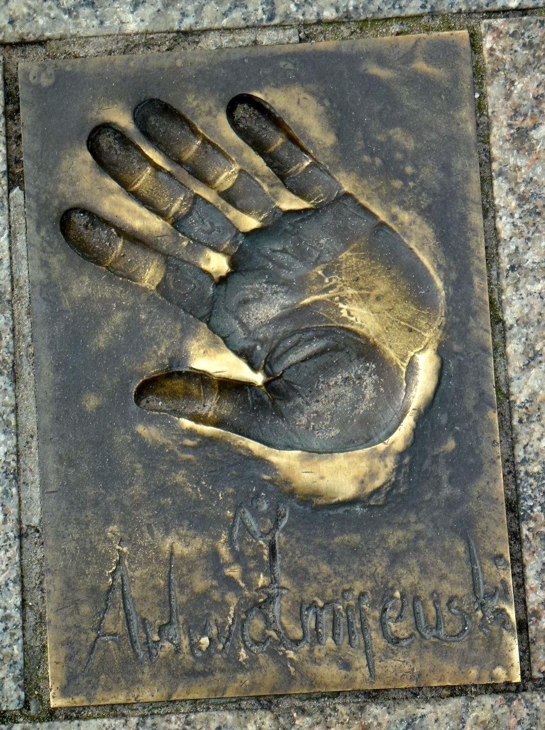 Odcisk gwiazdy na ul. Aleji Gwiazd w Międzyzdrojach woj. zachodniopomorskie pow. kamieński